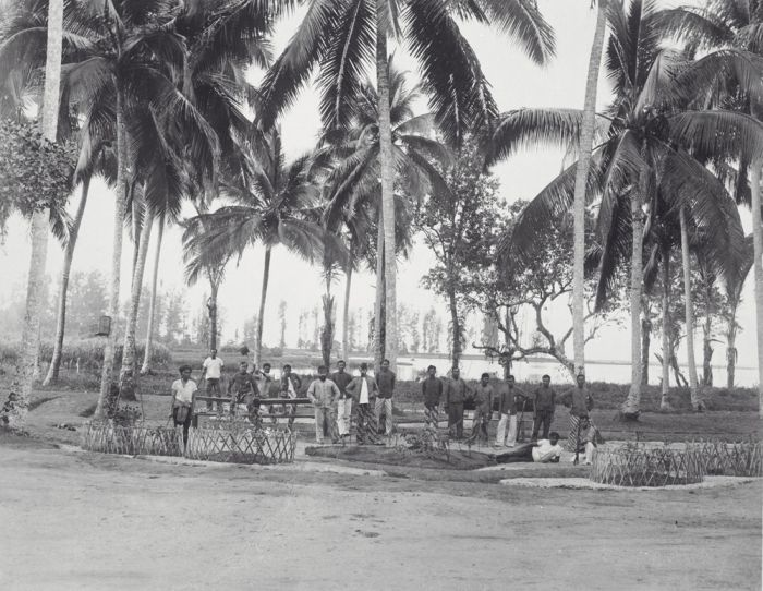 foto. Bivak, Teunom, westkust van Atjeh